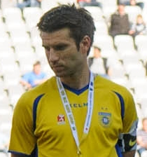 31 March 2012, Stozsice, Ljubljana, Slovenia - Olimpija during football game Olimpija - Domzale, round 27 of PrvaLiga 2011-2012.